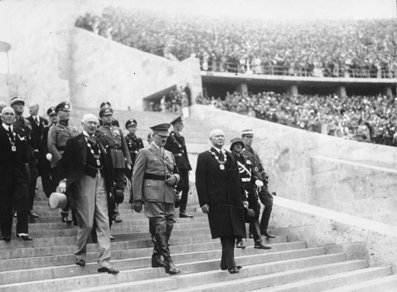 Berlin, XI. Olympiade, Eröffnung Scherl: Olympiade 1936 Vor der feierlichen Eröffnung der XI. Olympischen Spiele. Zusammen mit den Mitglieder des Internationalen und Nationalen Olympischen Komitees begibt sich der Führer und Reichskanzler durch das Marathontor in das Stadion. Links von Adolf Hitler [Henry] Graf Baillet-Latour, rechts Exzellenz [Theodor] Lewald. Abgebildete Personen: Hitler, Adolf: Reichskanzler, Deutschland Lewald, Theodor Dr.: Organisationskomitee der Olympischen Spiele, IOC, Staatssekretär, Deutschland Baillett-Latour, Henry de Graf: Präsident des Internationalen Olympischen Komitees (IOC), Belgien